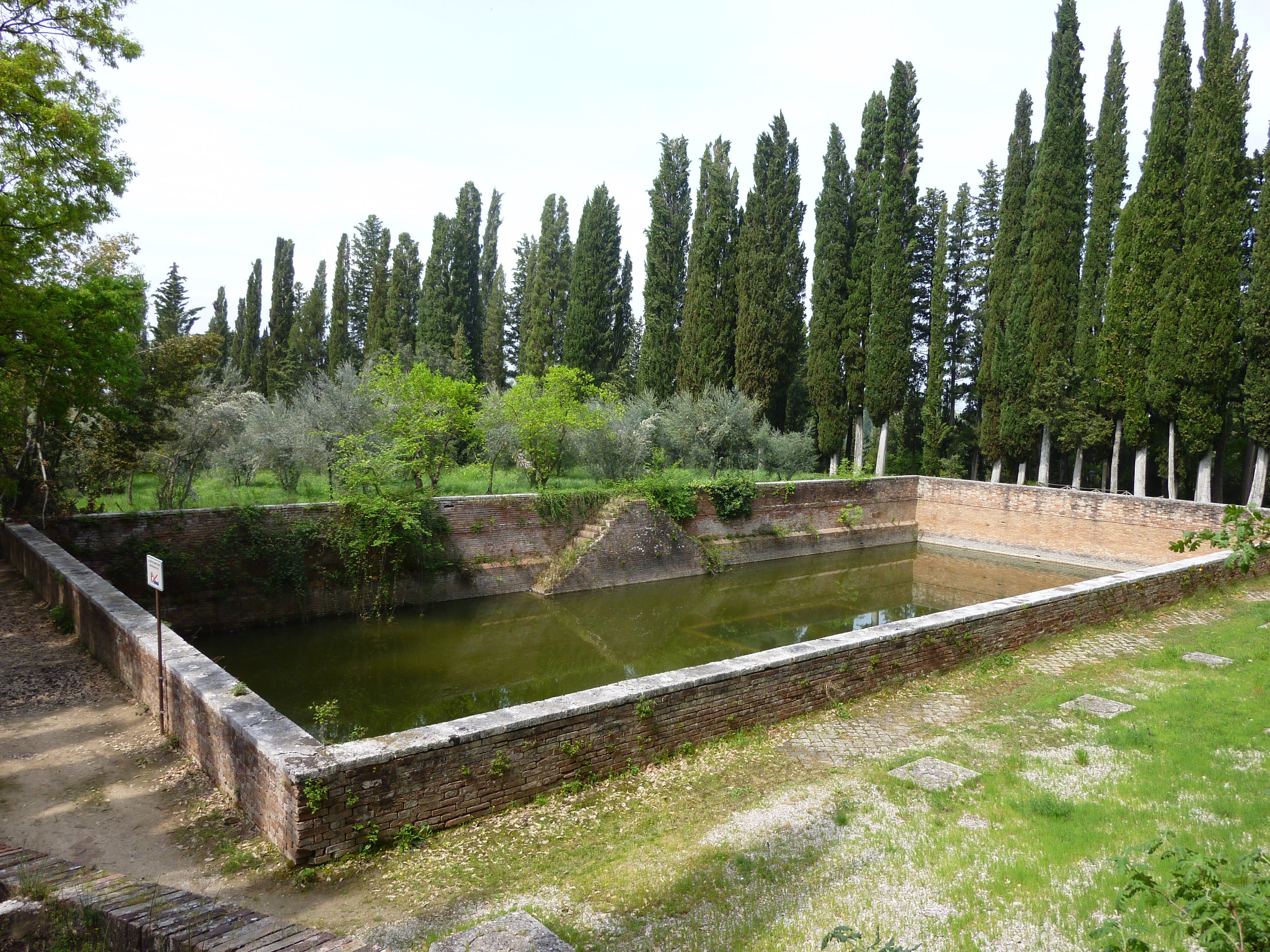 Fischteich (Monte Oliveto Maggiore)